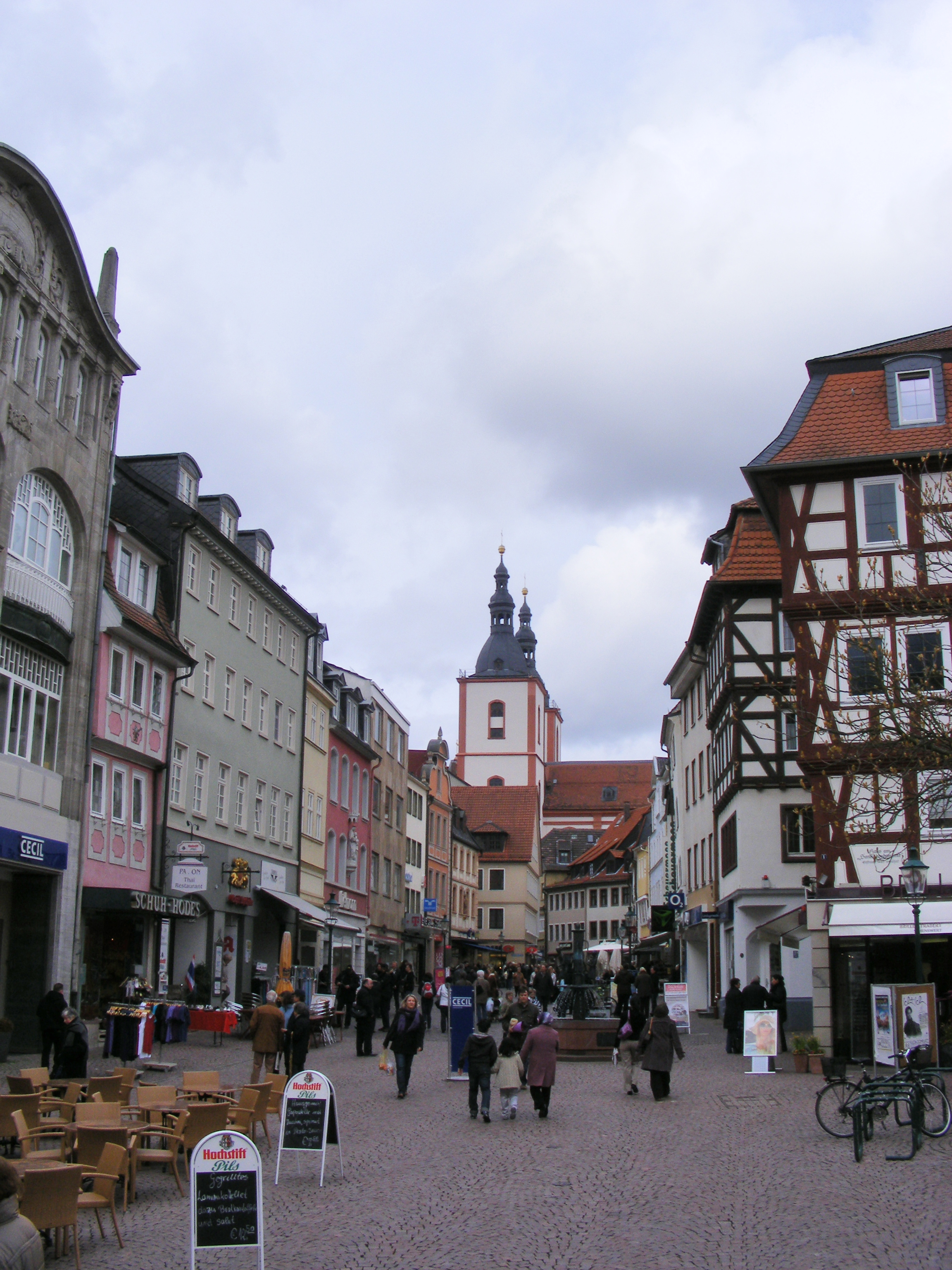 Fulda - Marktstraße (in nordwestl. Richtung gesehen)